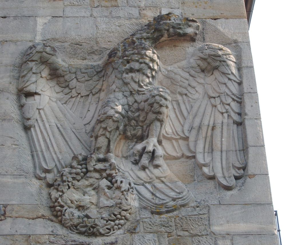 Adler am Deutschen Weintor bei Schweigen-Rechtenbach.